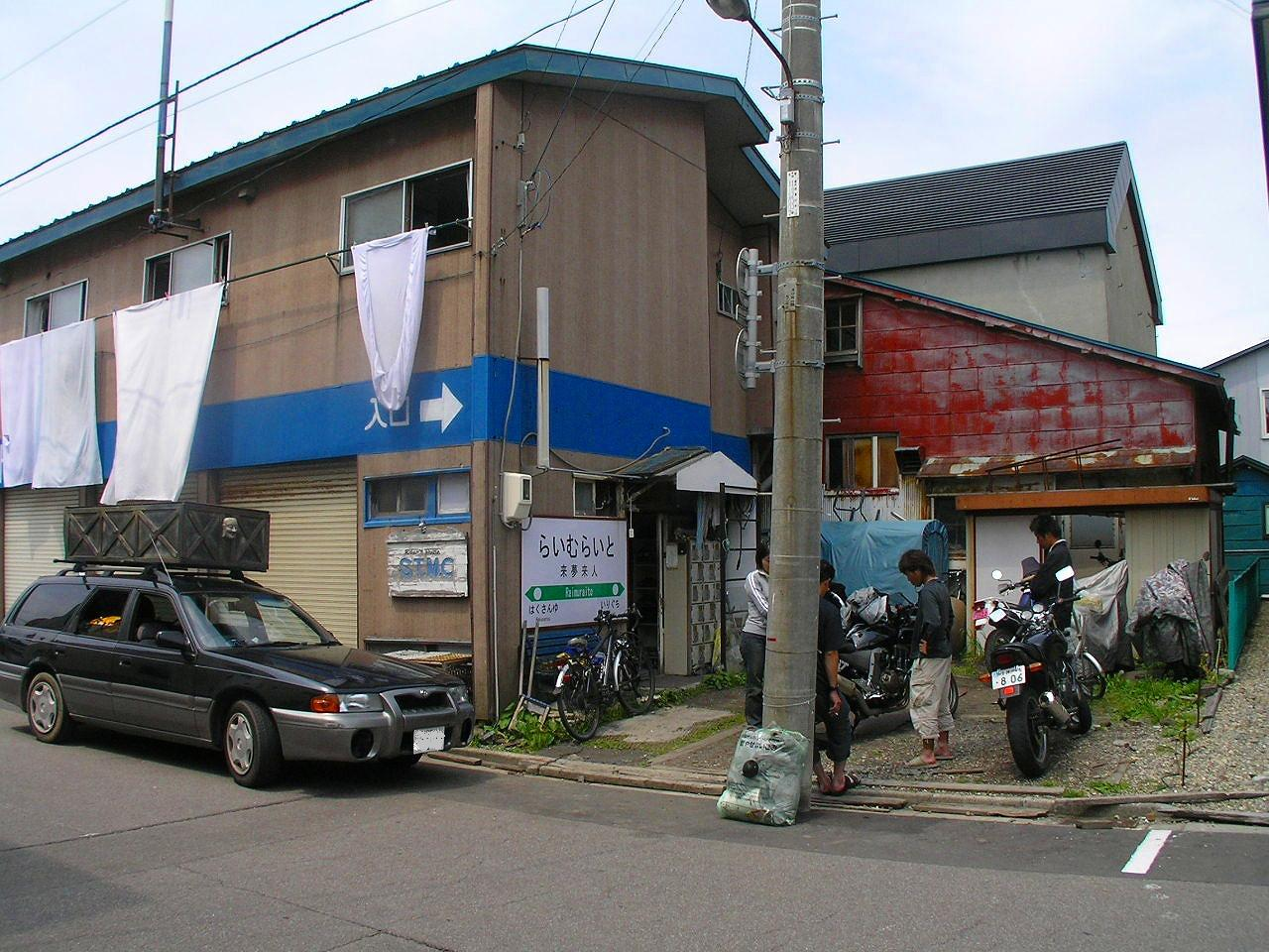 ライダーズハウス函館来夢来人